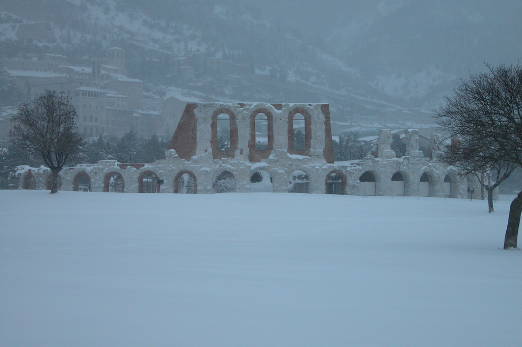 I resti del teatro romano di Gubbio, Umbria, Italiagubbio